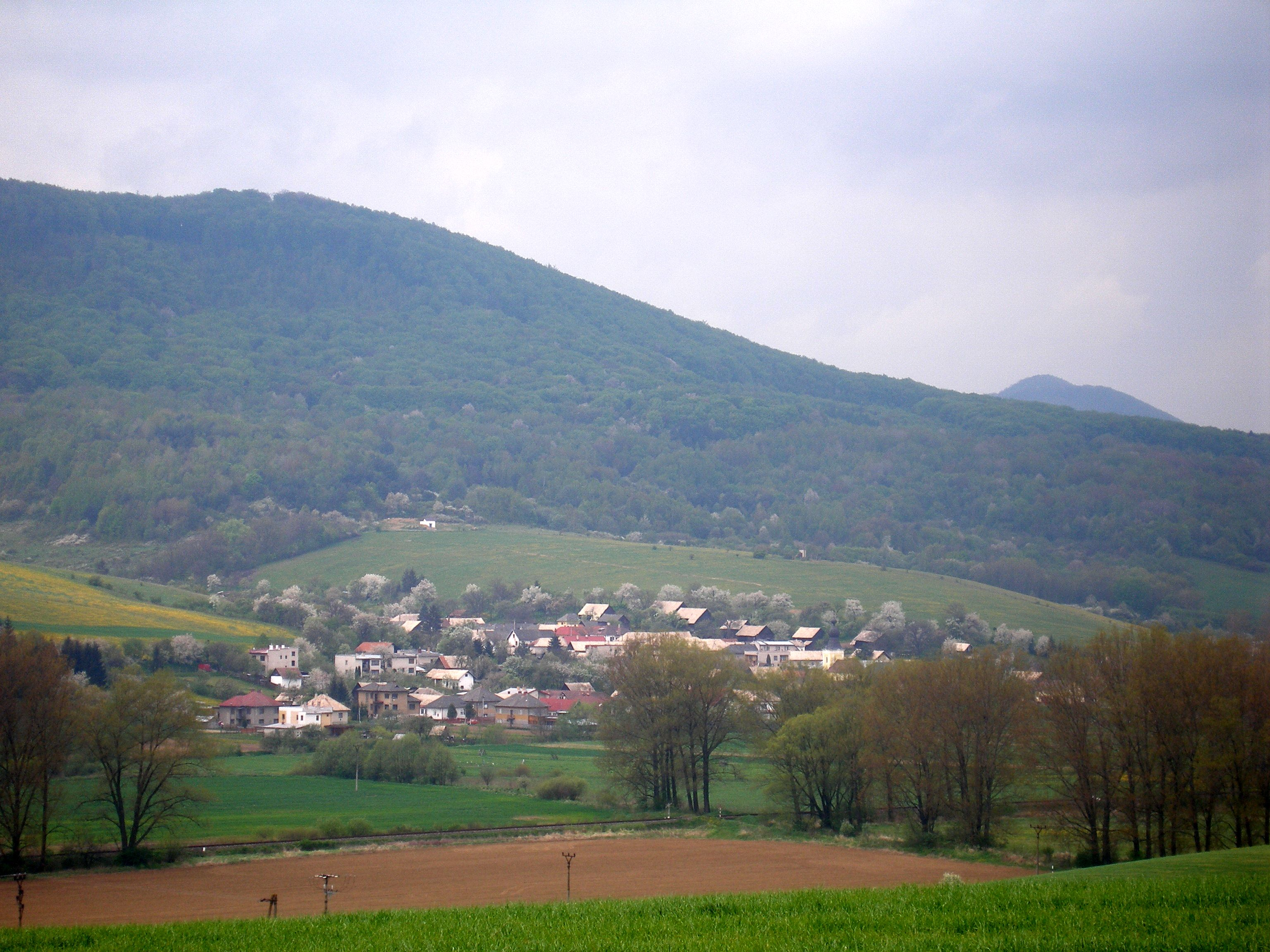 Obec Fulianka okres Prešov región Šariš